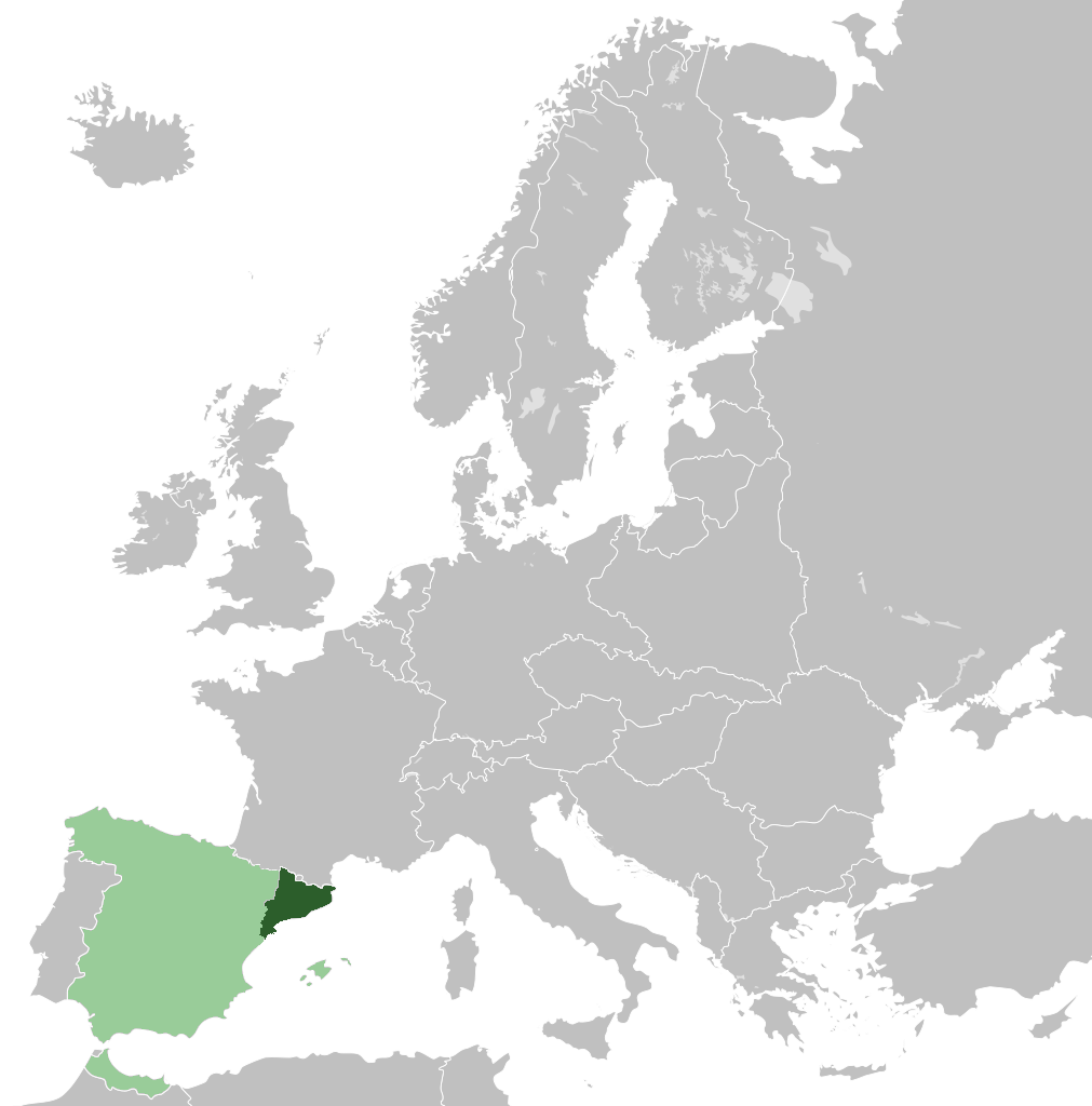 Каталонская Республика (1931), Каталонское государство (1934)